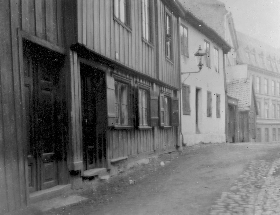 Mellemgaten 1-3. Foto N. Engstrøm/Oslo Museum, ca. 1920.